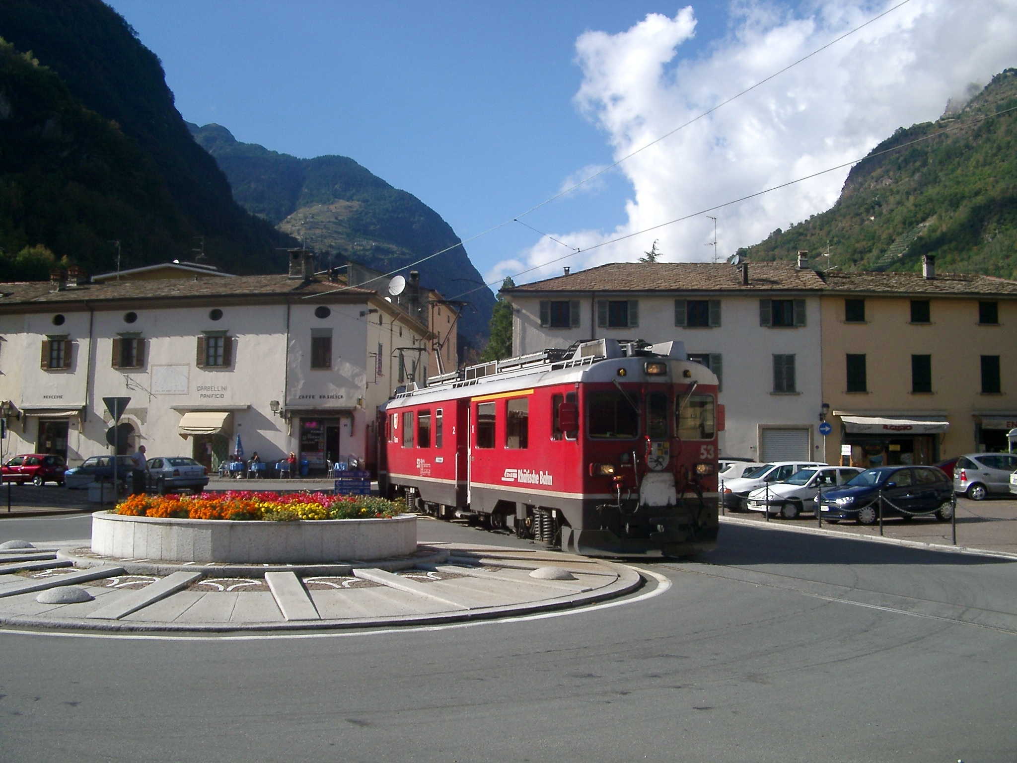 Berninabahn in Tirano, Italy